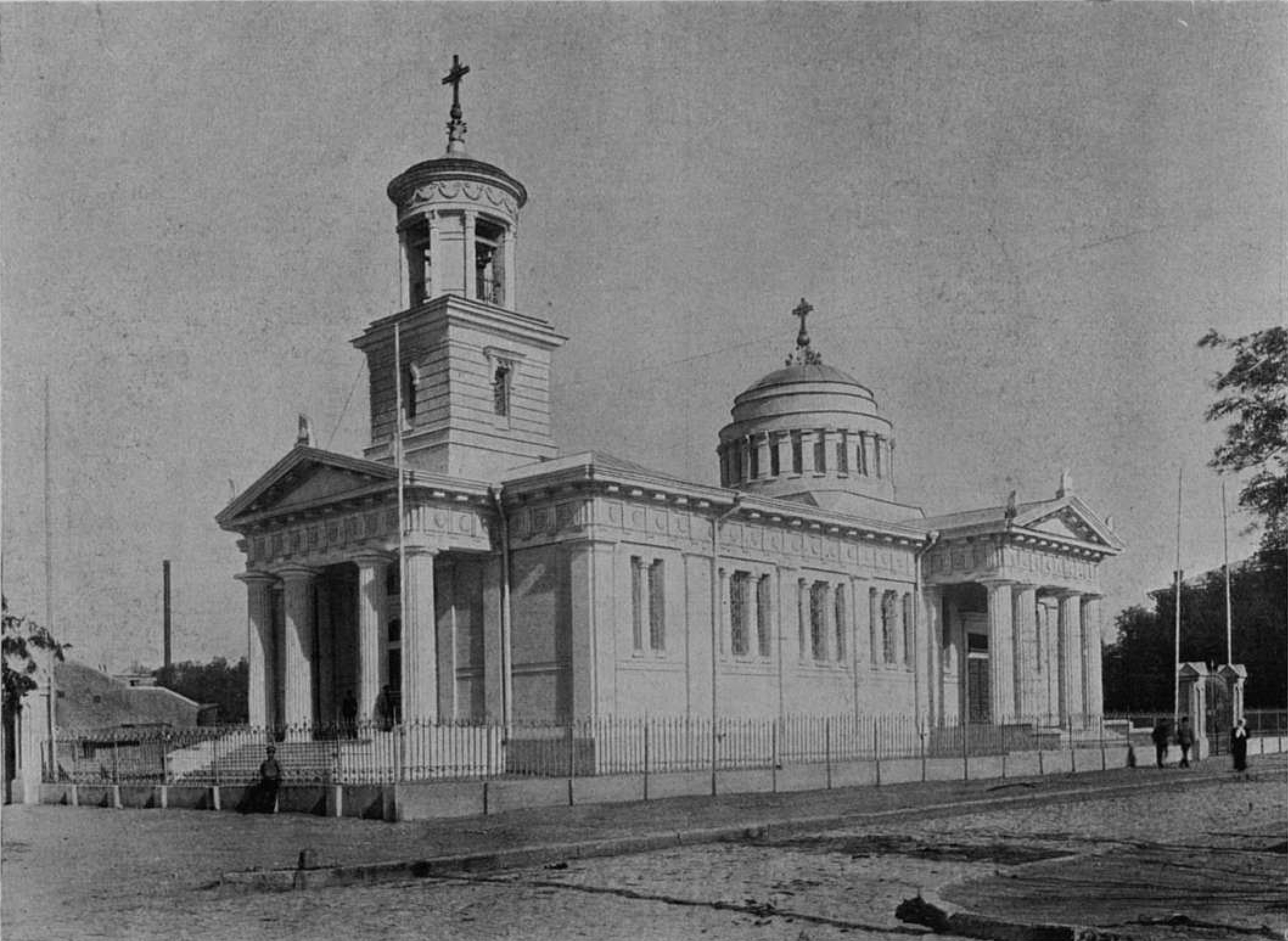 Греческая церковь в честь Благовещения Пресвятой Девы Марии. Ростов-на-Дону.